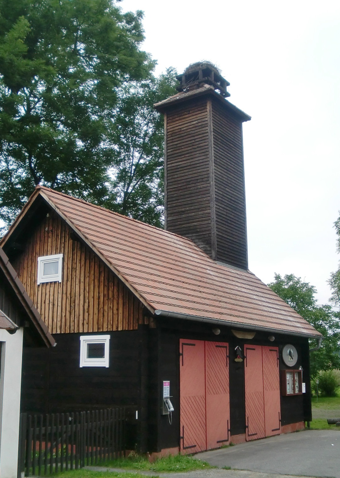 Gebäude der freiwilligen Feuerwehr in Lehde